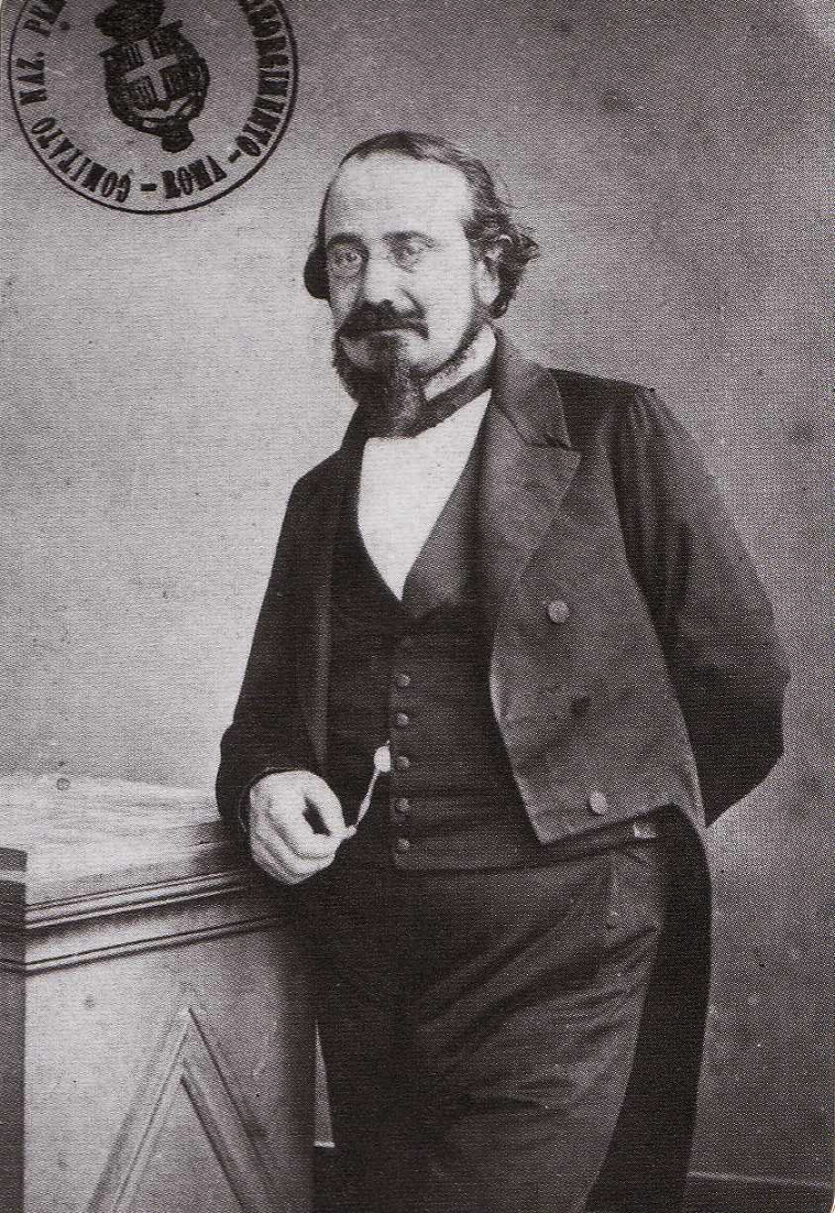 Fotografia del filosofo Bertrando Spaventa (1817-1883), deputato del Regno d'Italia (da non confondere col fratello Silvio)